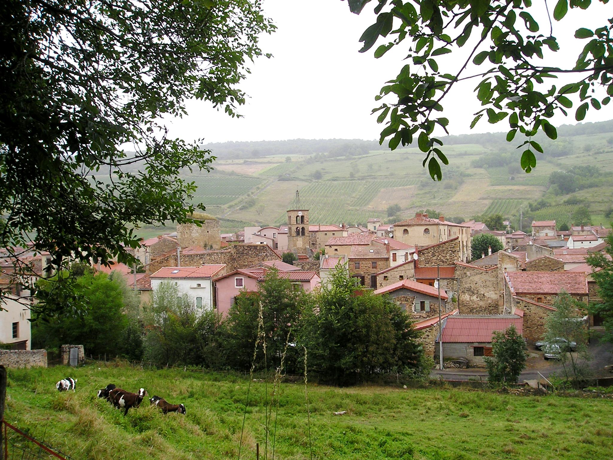 Boudes (Puy de Dômes)